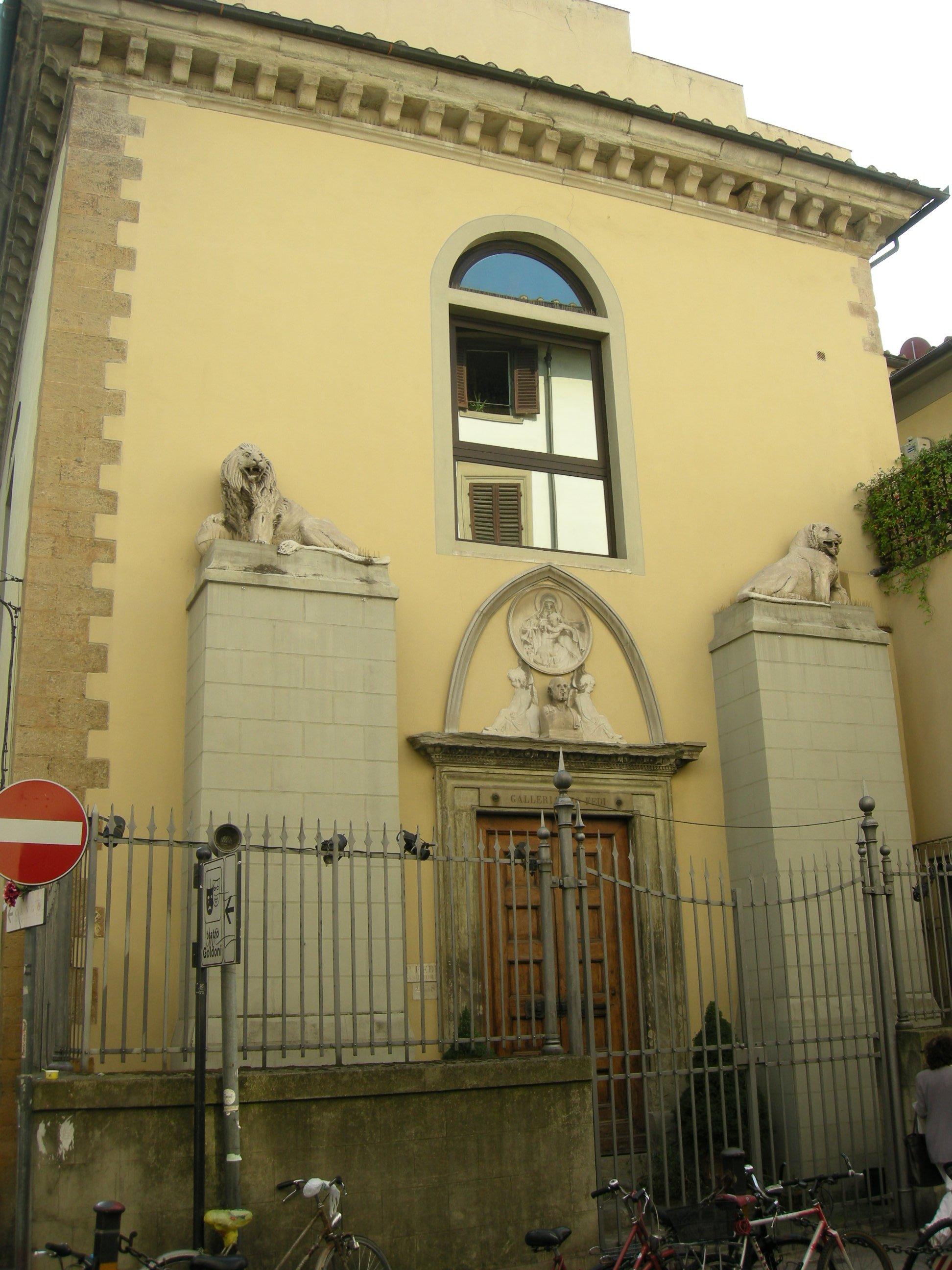 Galleria di pio fedi